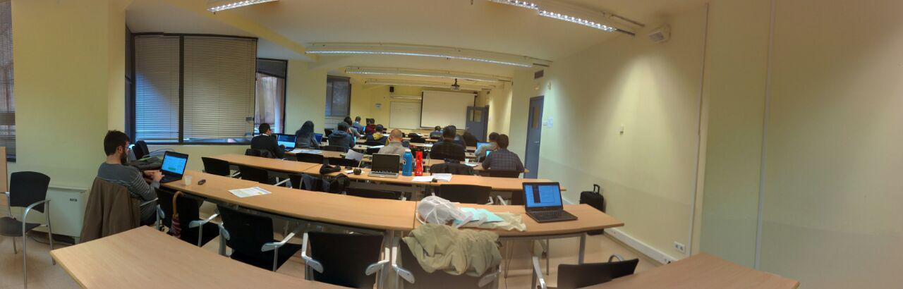 کارگاه‌ آموزشی در ساختمان ورتکس دانشگاه UPC